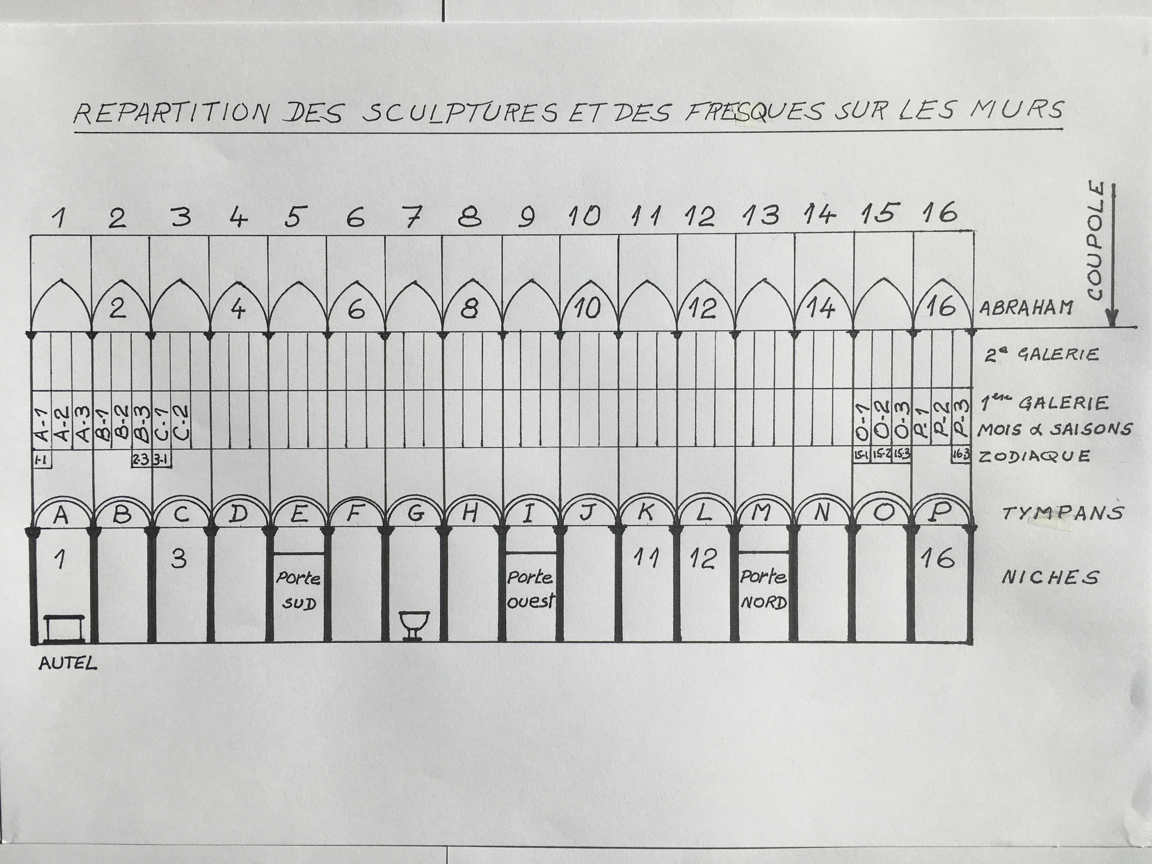 Disposition des fresques et statues sur mur interne